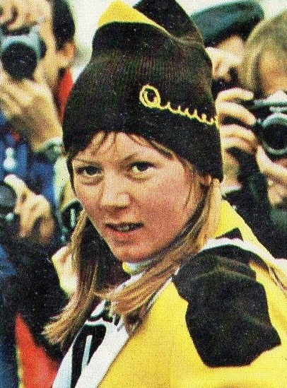 CAMPIONI dello SPORT 1973/74-Figurina n.334- PROELL - AUSTRIA